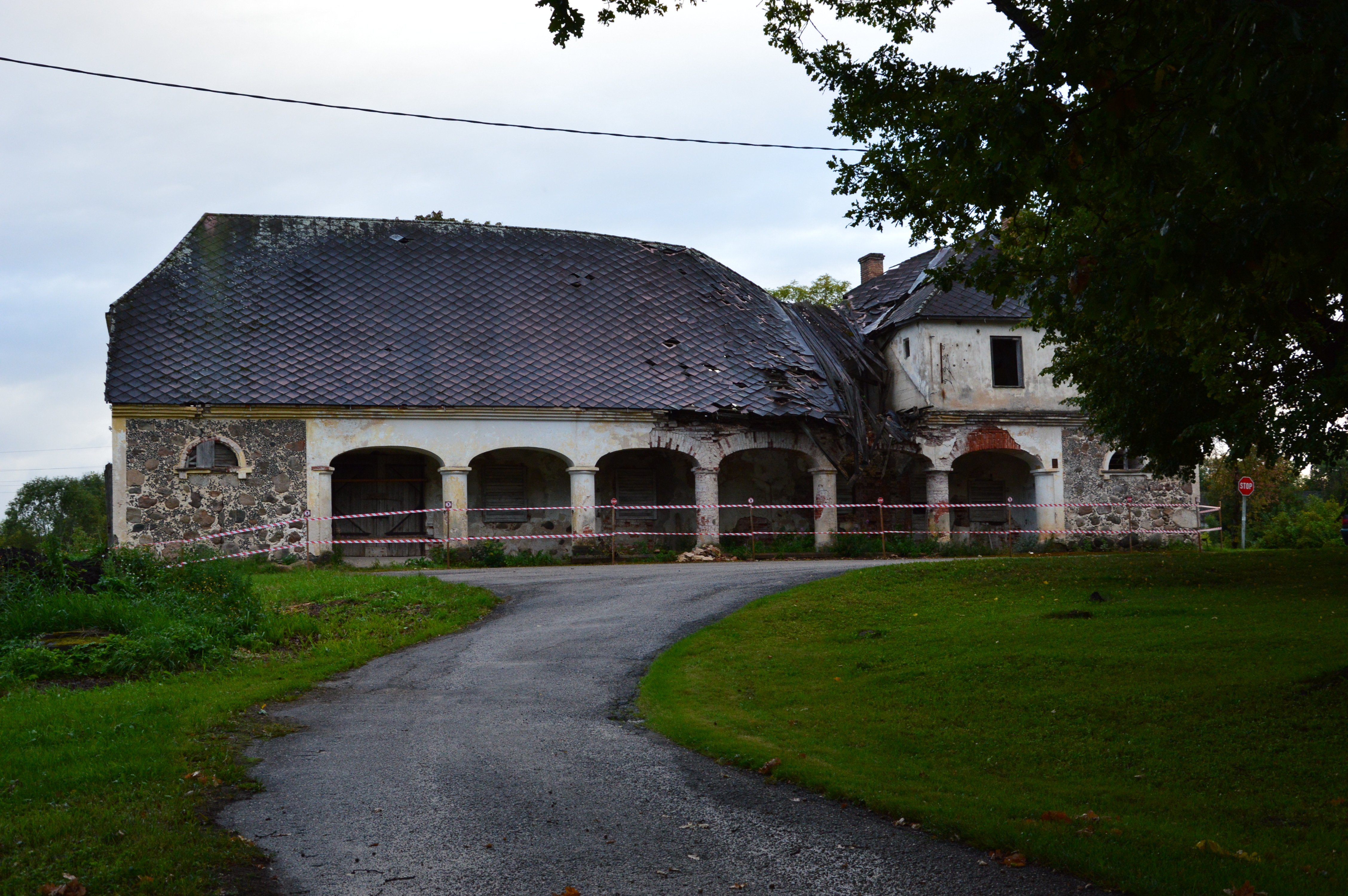 Dzērbene mõis